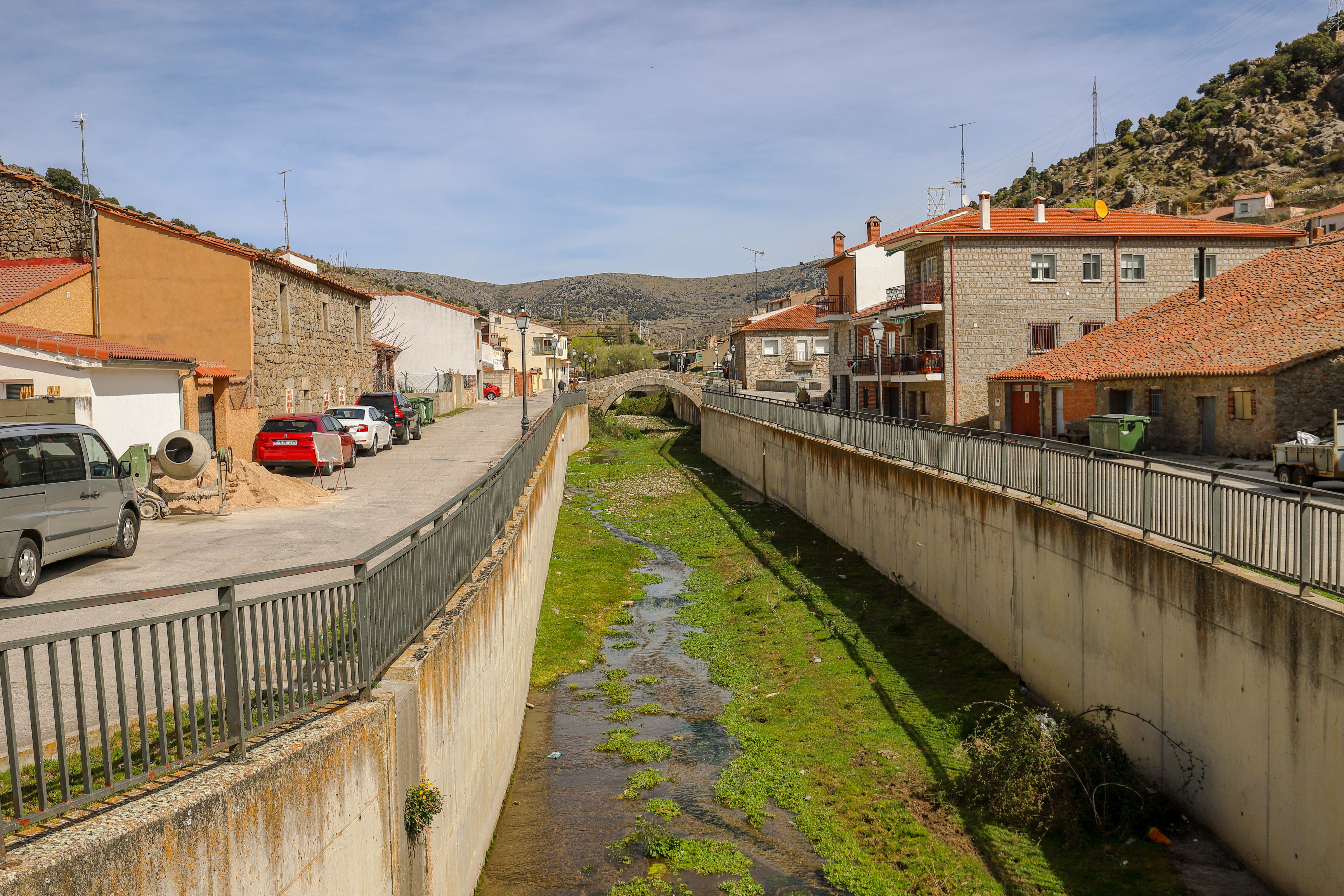 Herradón de Pinares es un municipio de la comarca de Ávila, en la provincia de Ávila.